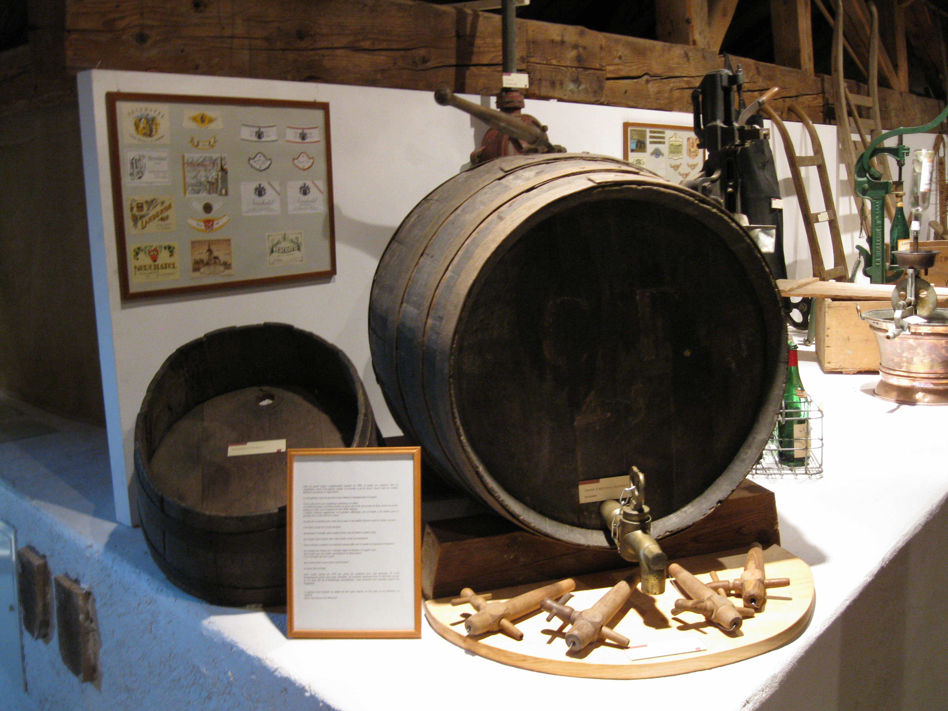 Mueseum mit alten Waffen und Rebaugeräten